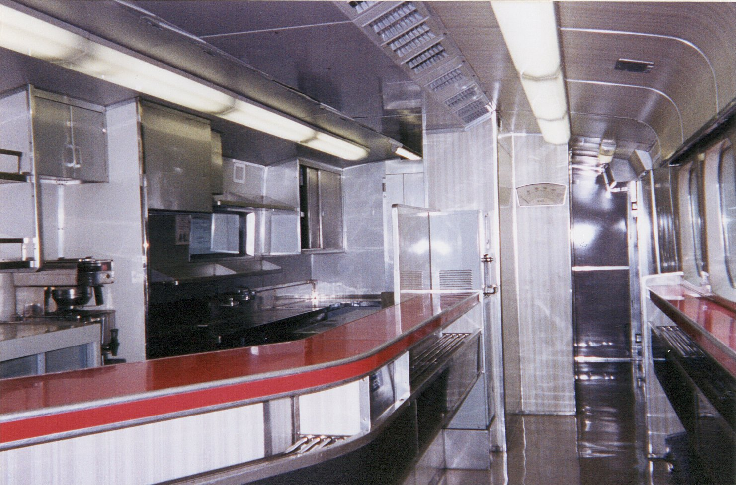 撮影日不明。投稿者自身の撮影